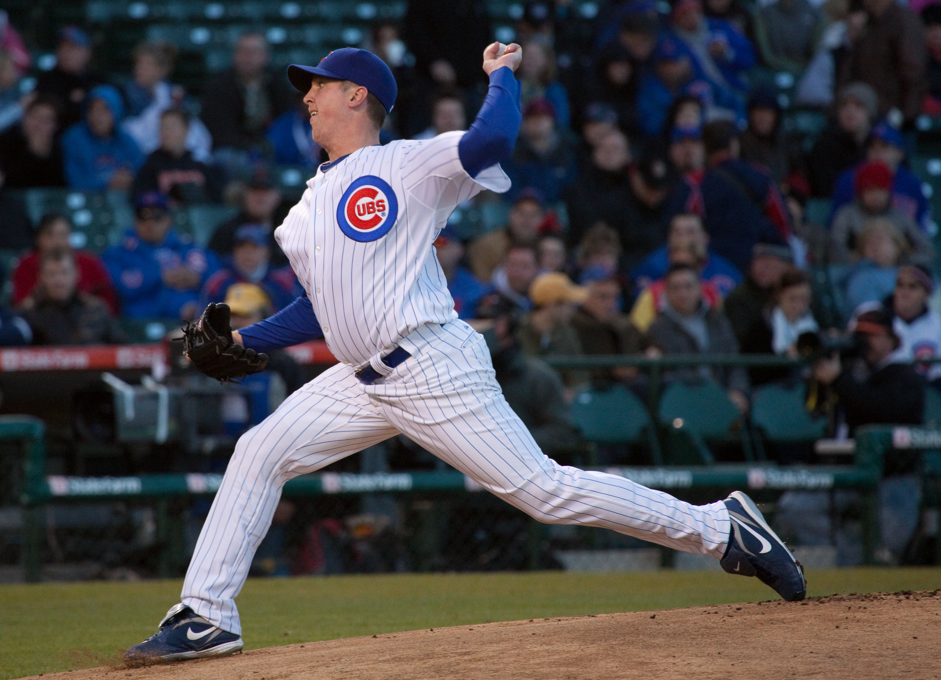 Tom Gorzelanny